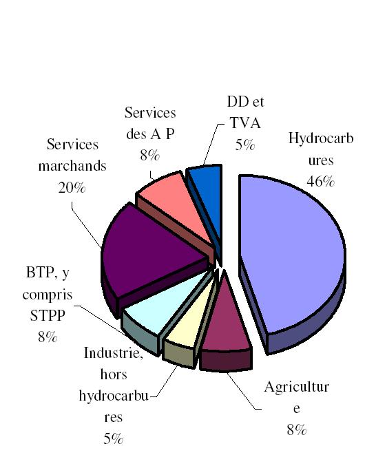 Répartition sectorielle du PIB de l'Algérie pour l'année 2006.